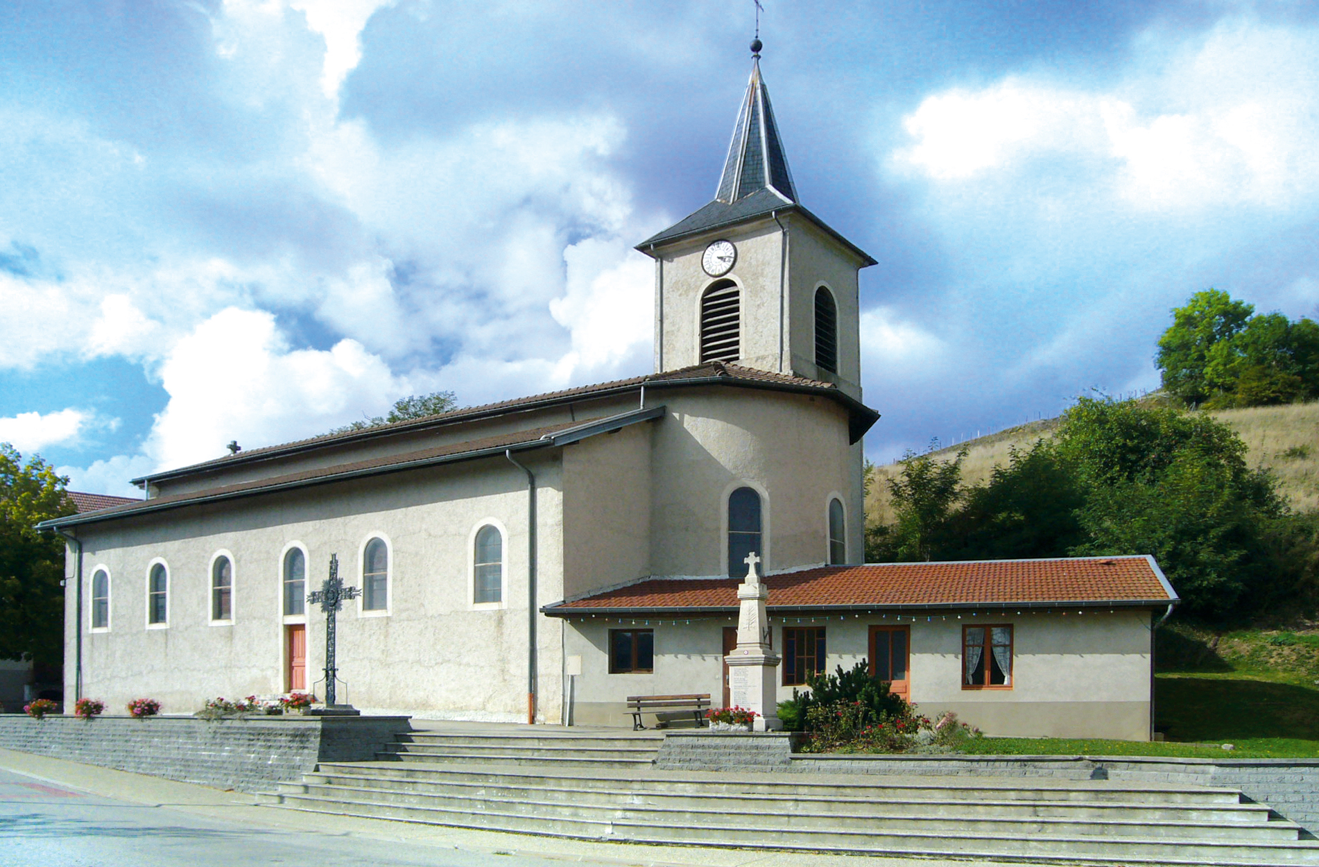 Eglise de St Michel de St Geoirs